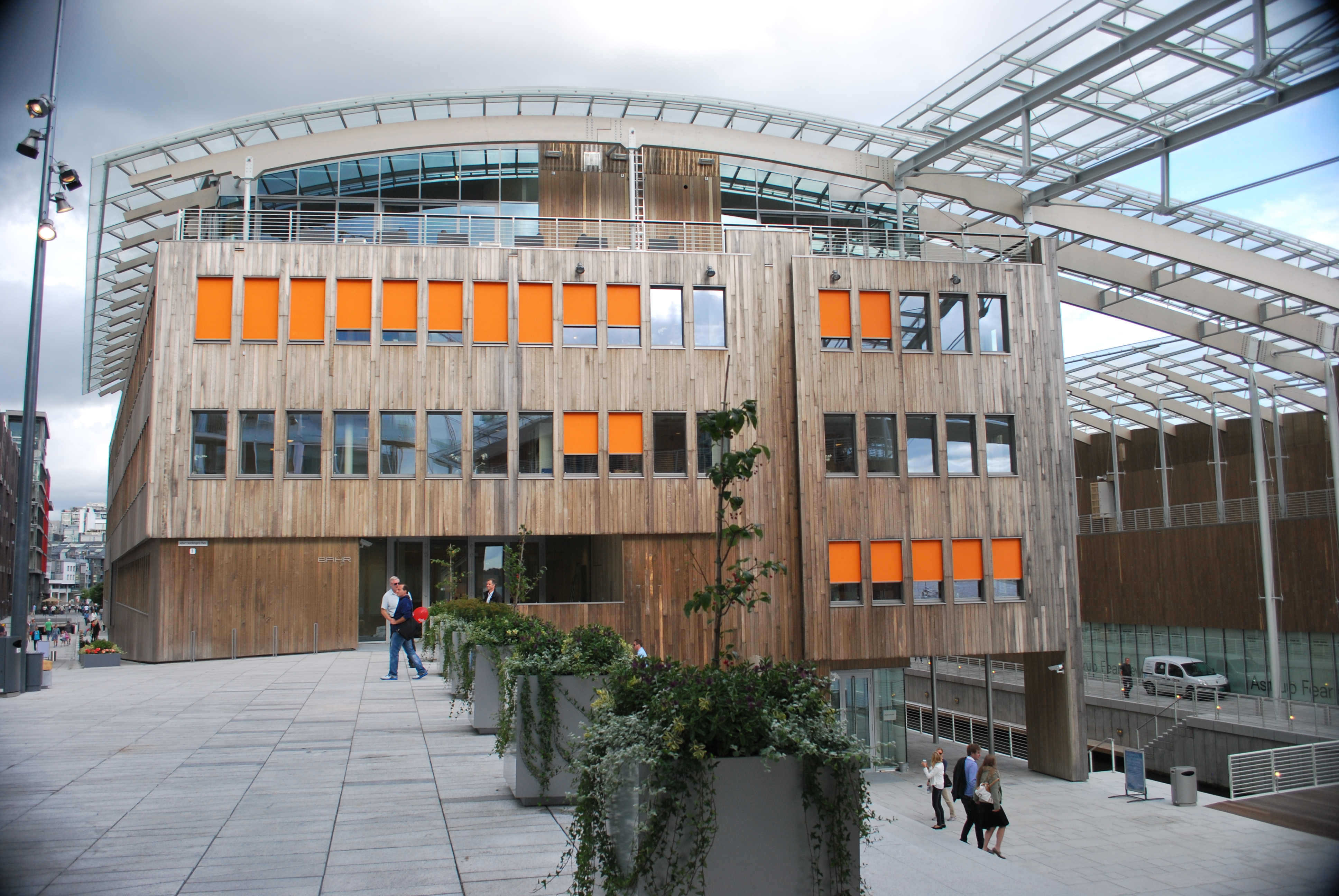 Albert Nordengens plass og bygget til advokatfirmaet Bahr, Tjuvholmen, Oslo